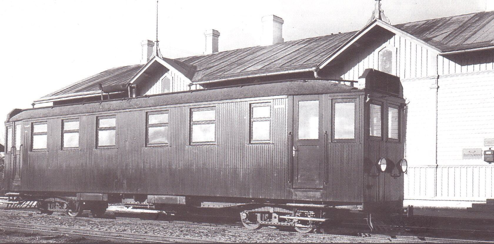 Jokioisten rautatien uudempi moottorivaunu